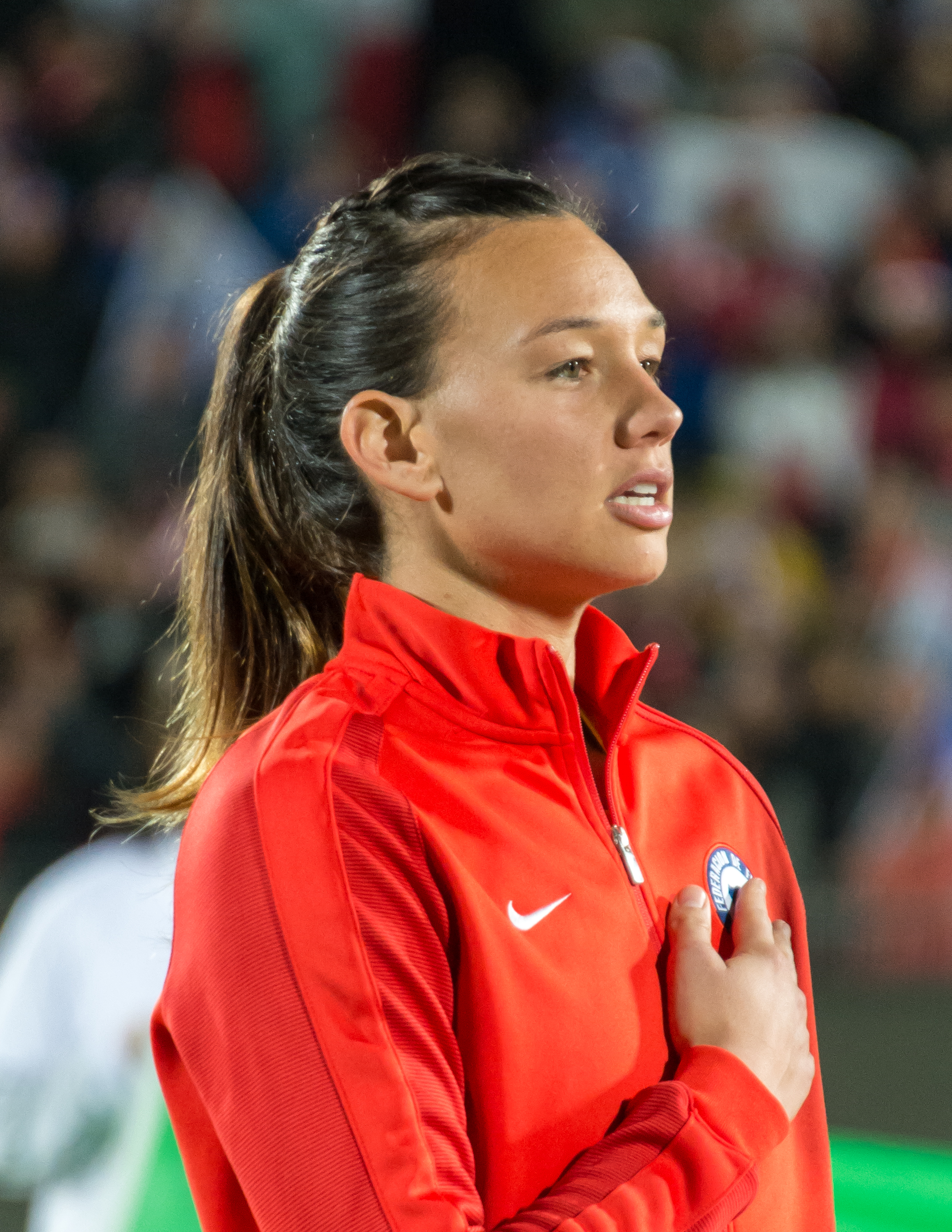 Christiane Endler, Chile v Colombia, Estadio Nacional, Ñuñoa, Santiago, Chile.